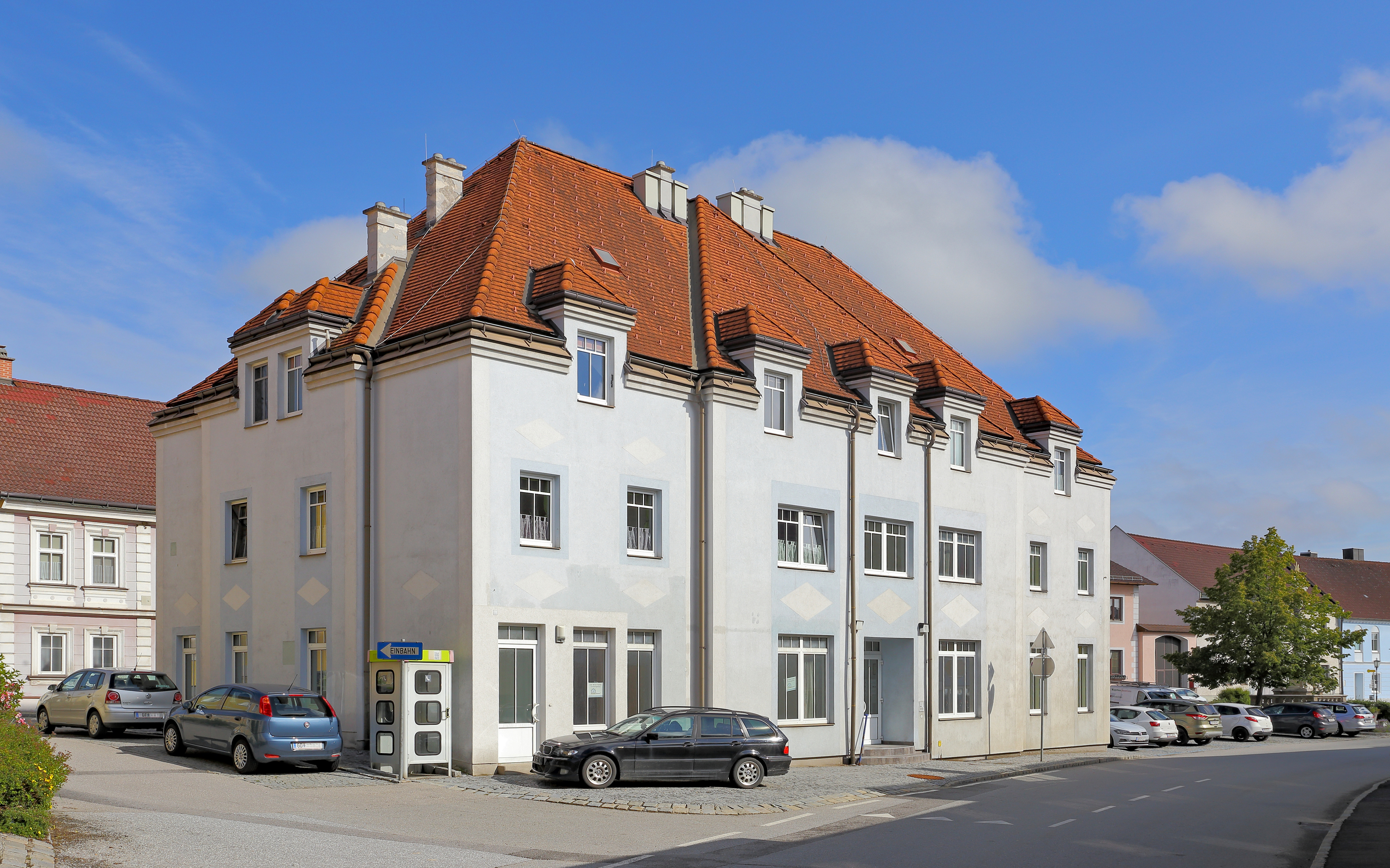 Gemeindeamt in Kirchberg am Walde, Bezirk Gmünd